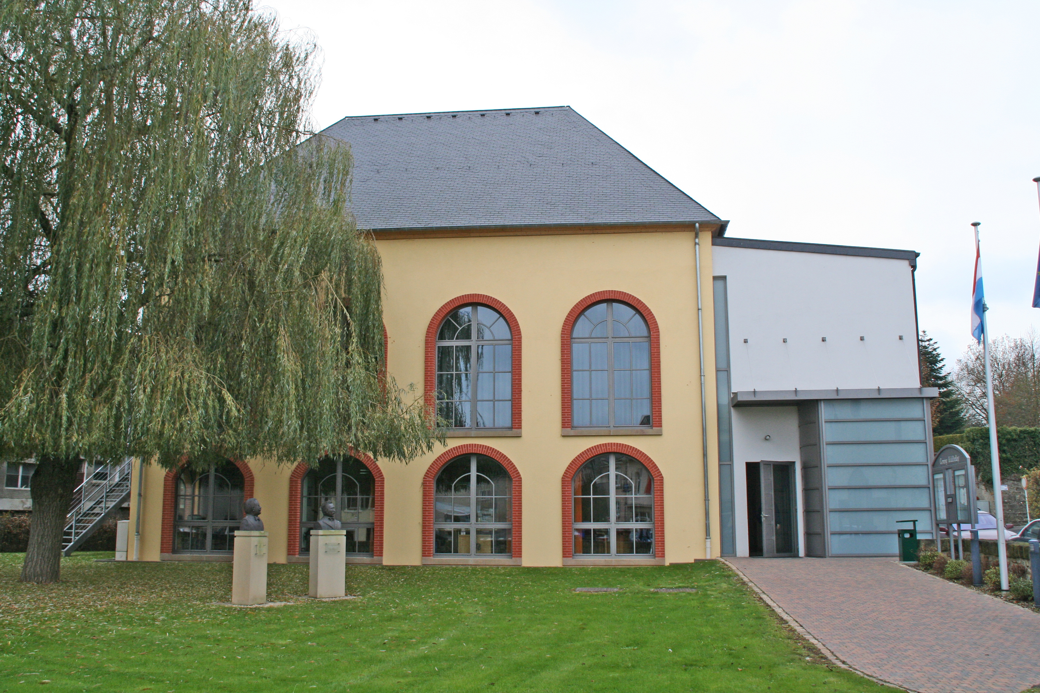 Gemeng Waldbëlleg (Mat ernimme vum Fotograf, soss Blëtz...) Kategorie:Gemeng Waldbëlleg